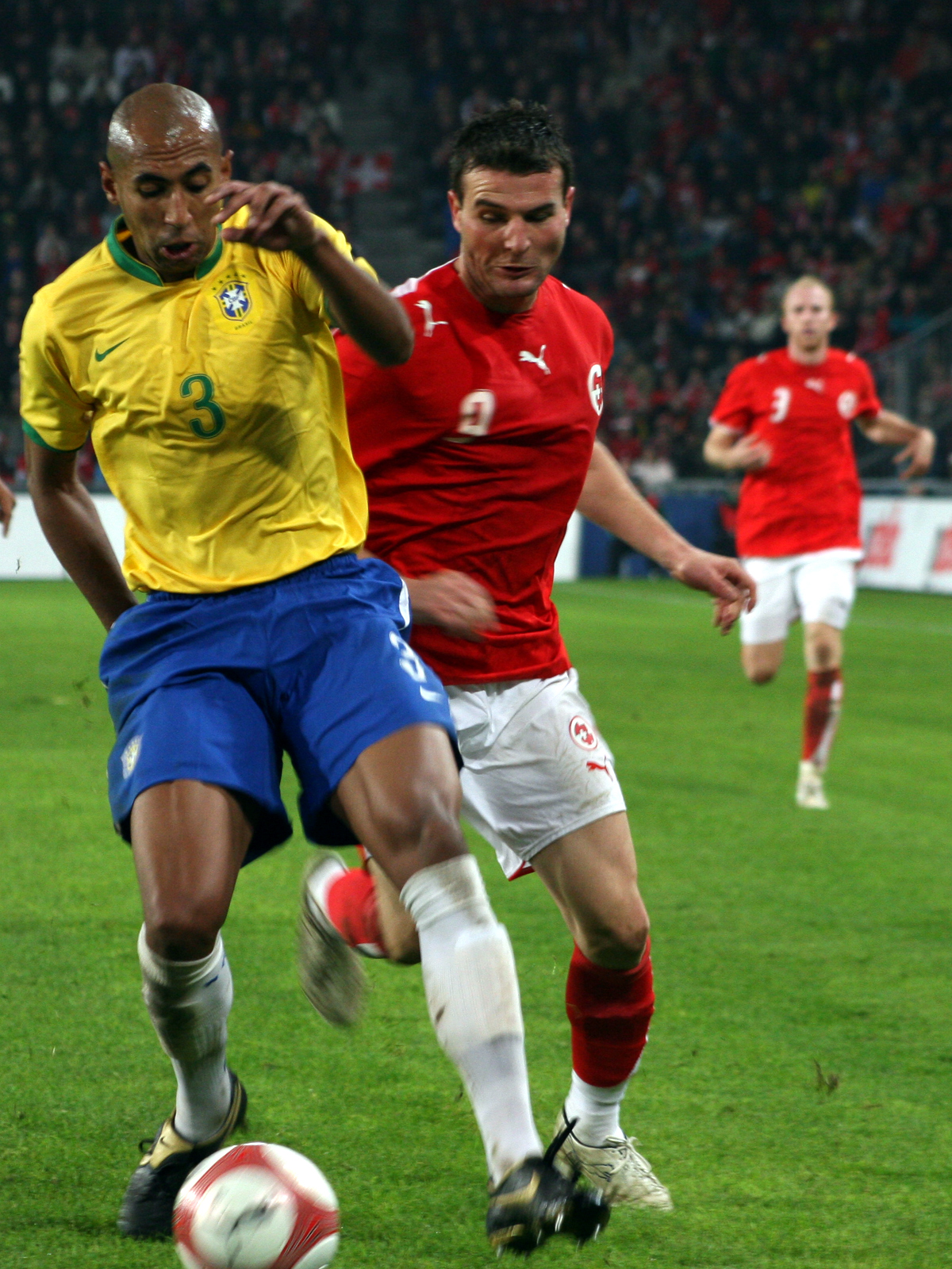 Alexander Frei, St. Jakob Stadion, Basel (Switzerland), Switzerland - Brasil 1:2